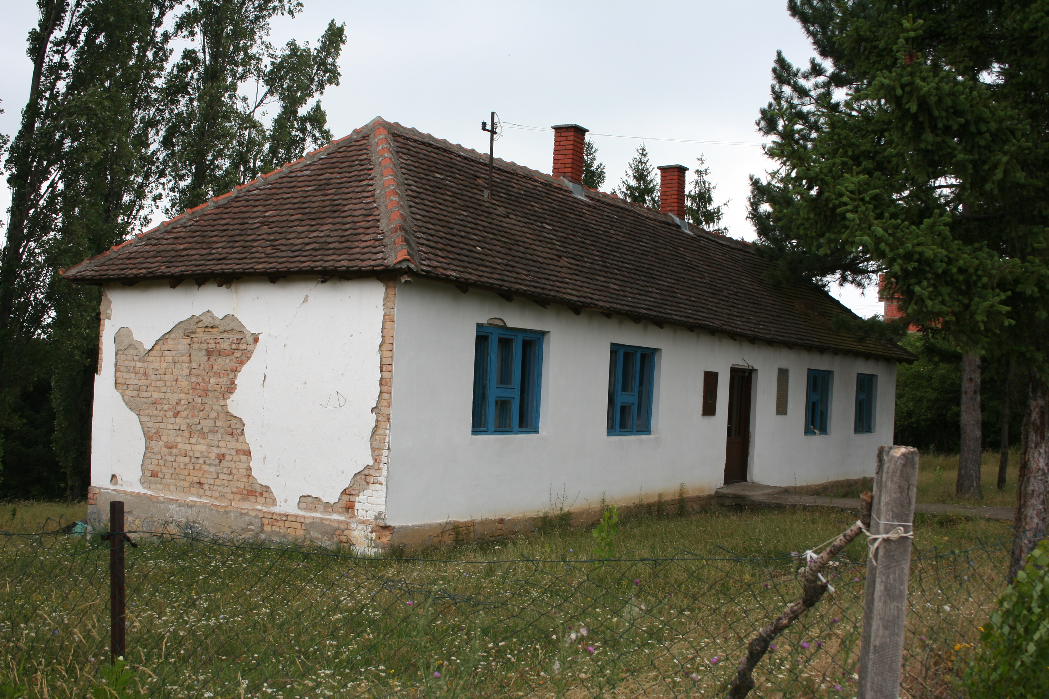 Seoska škola, Bresnica (Koceljeva)